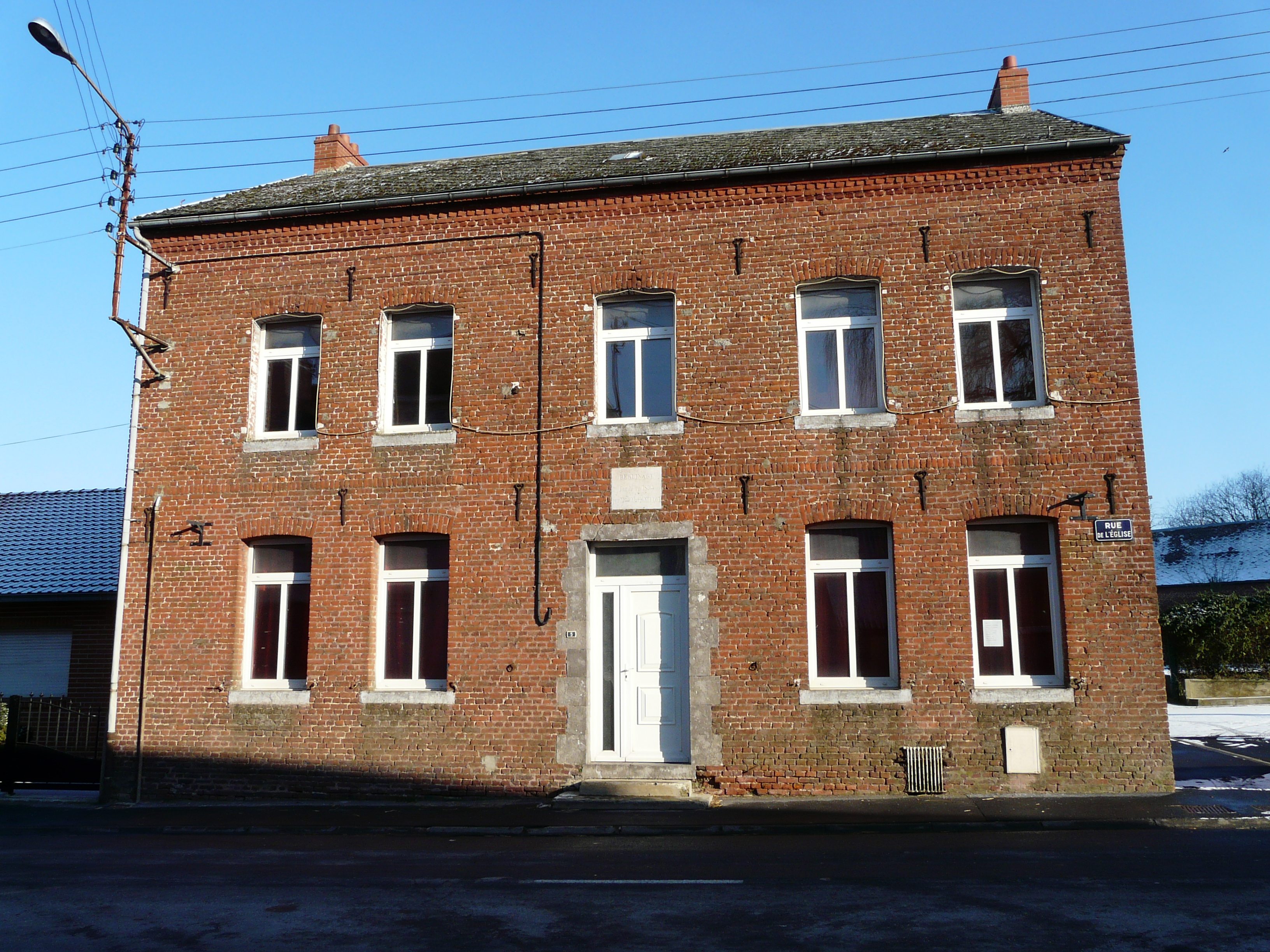 Béguinage à Clary (Nord)